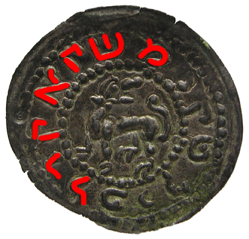 Brakteat "hebrajski" Mieszka III (zaznaczony napis "משקא קרל"